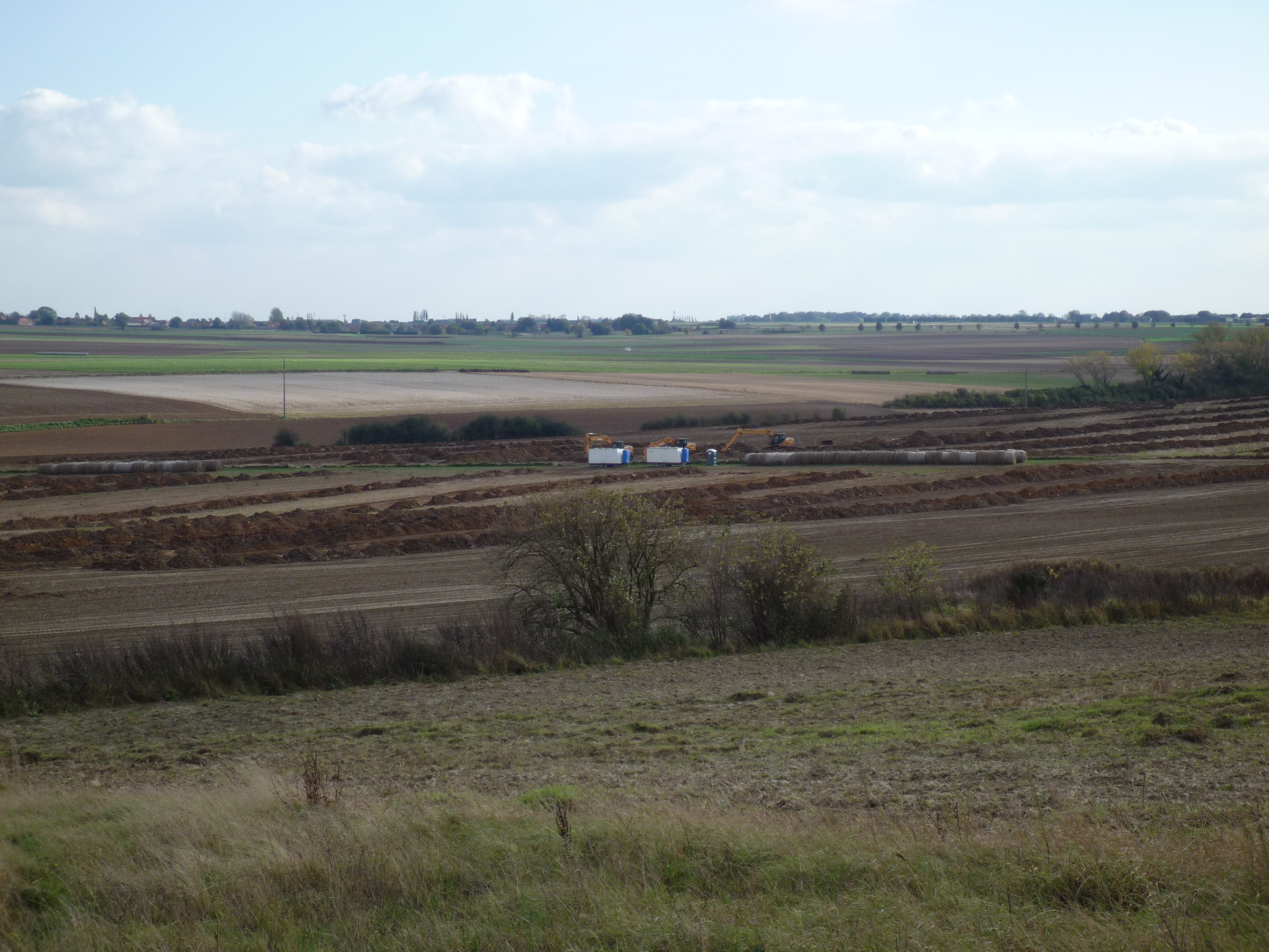 Description Fouilles archéologiques préliminaires avant la construction du canal Seine-Nord Europe. Les fouilles ont débuté fin septembre à Aubencheul-au-Bac. En arrière plan le village d'Épinoy. DateSourceOwn workAuthorNom (P@d@w@ne) Fouilles archéologiques préliminaires avant la construction du canal Seine-Nord Europe. Les fouilles ont débuté fin septembre à Aubencheul-au-Bac. En arrière plan le village d'Épinoy.